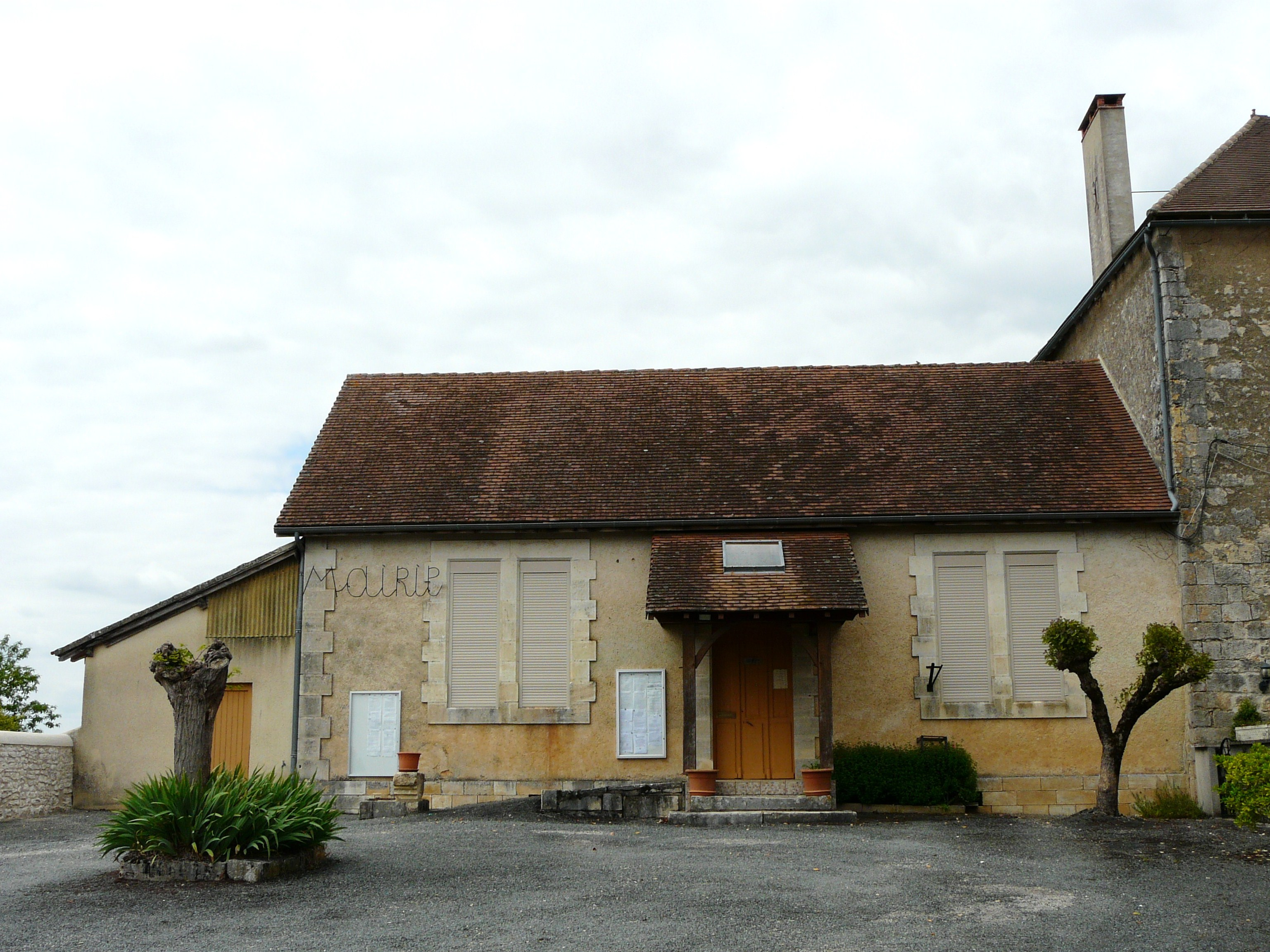 La mairie de Gabillou (ancienne école), Dordogne, France.